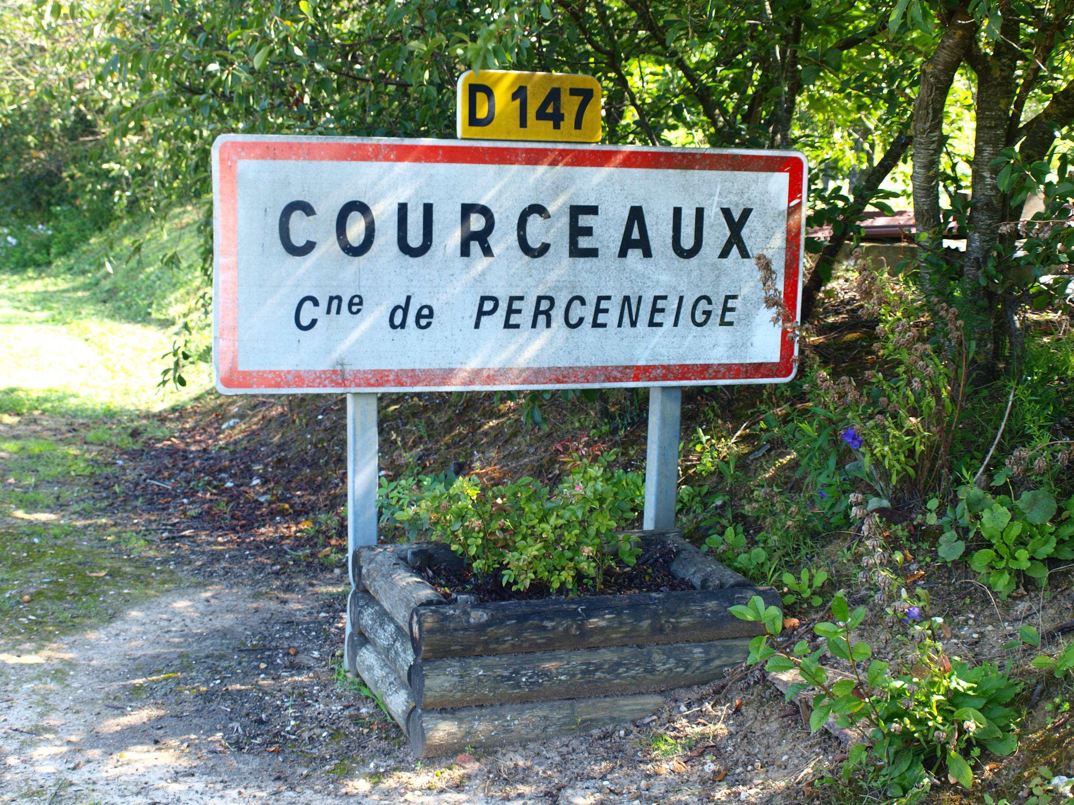 Perceneige (Yonne, France) ; village de Courceaux : panneau d'agglomération